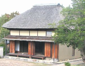 一茶逗留の久保田家の離れ屋